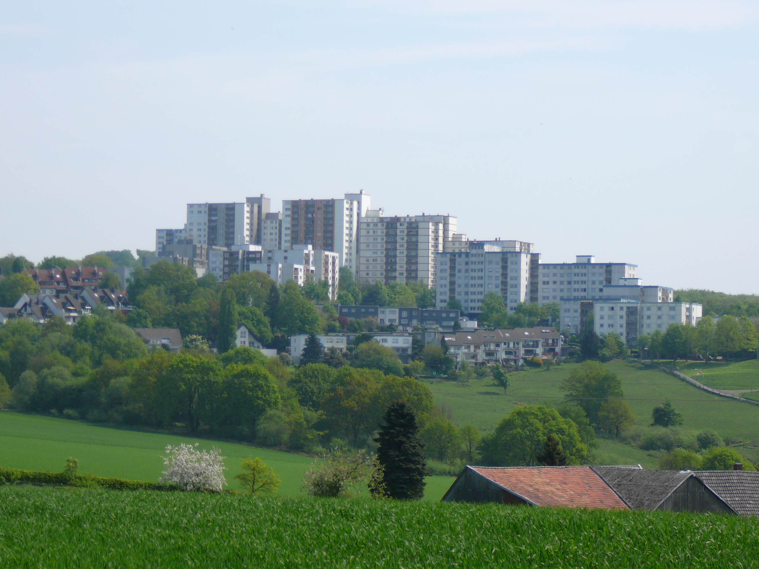 Am Jagdhaus, Wuppertal